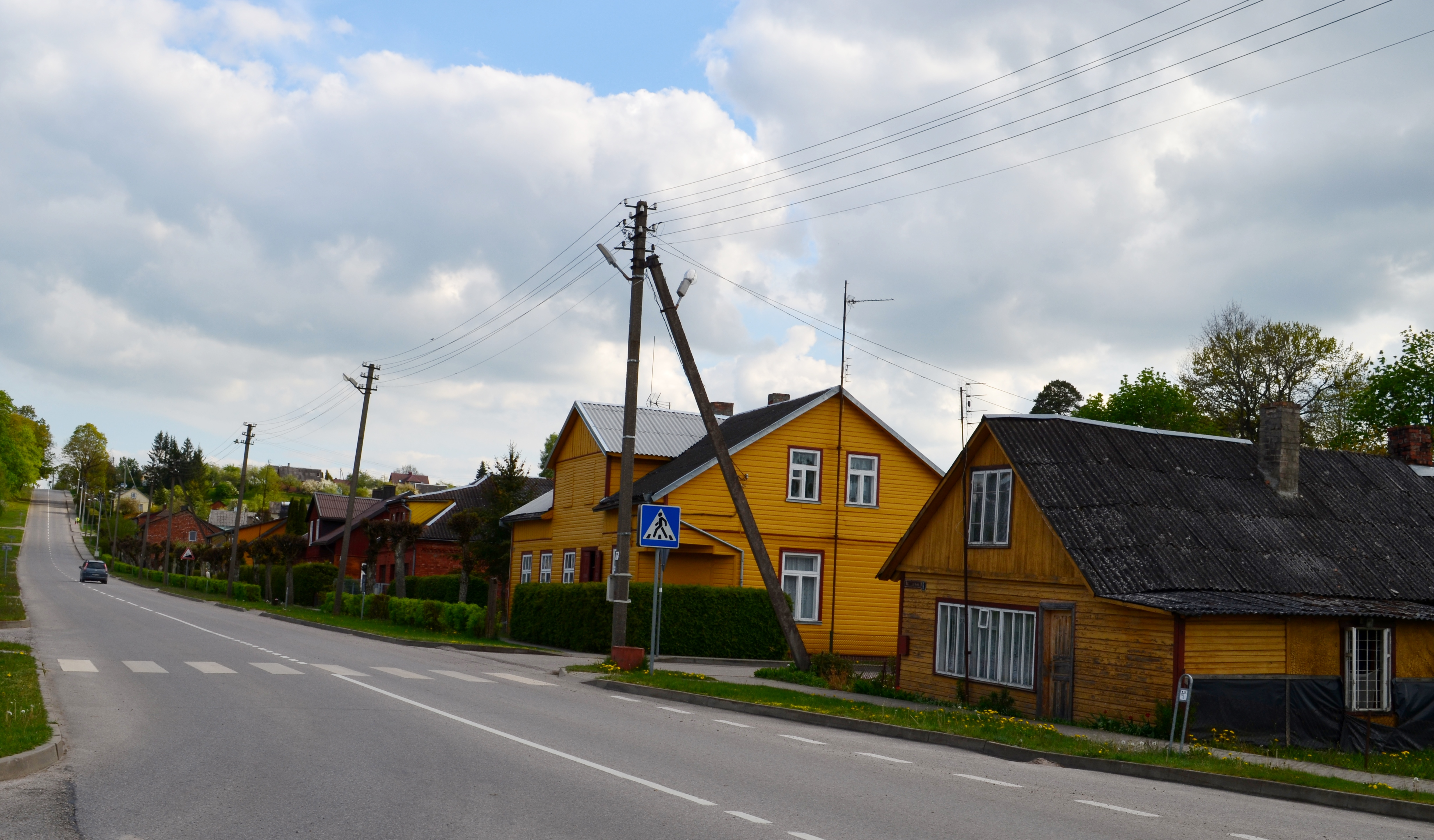 Taikos gatvė Gelgaudiškyje, Šakių raj.